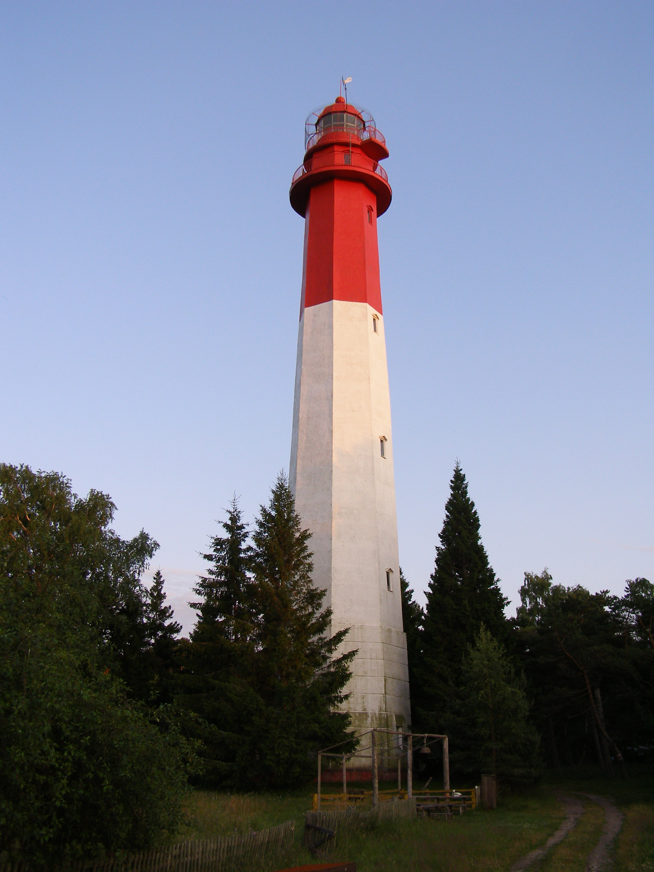 Naissaare tuletorn